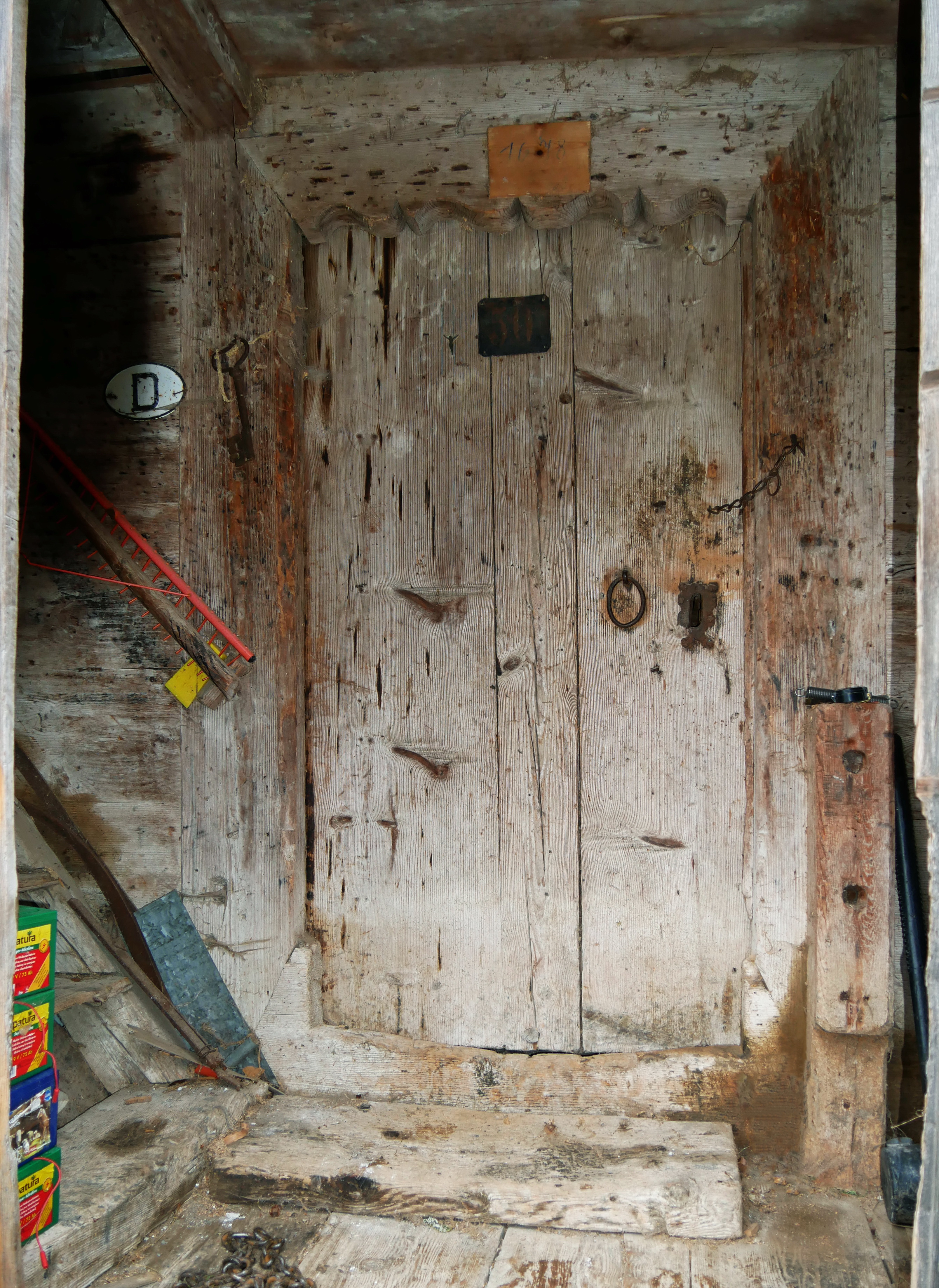 Steingaden, Ortsteil Schlauch, Schlauch2: erdgeschossiger Getreidekasten mit der Jahreszahl 1678 über der Tür, Gesamtansicht